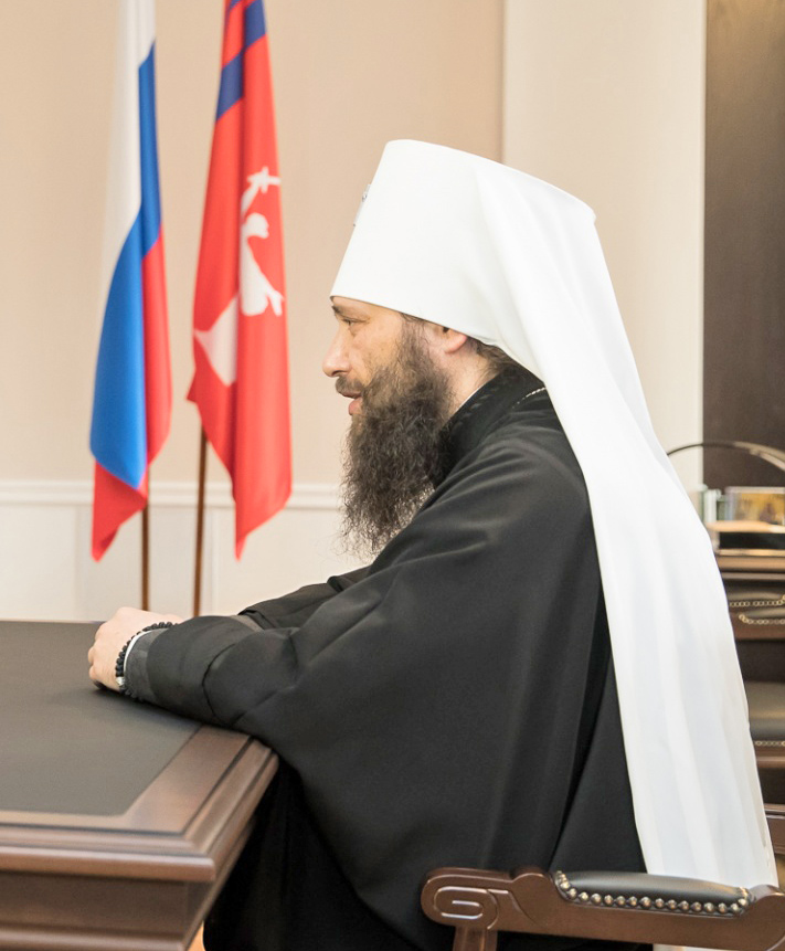 Митрополит Феодор на встрече с губернатором Волгоградской области Андреем Бочаровым